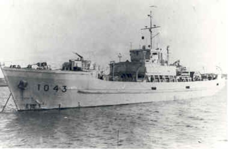 Hr.Ms Voorne poseert voor een foto